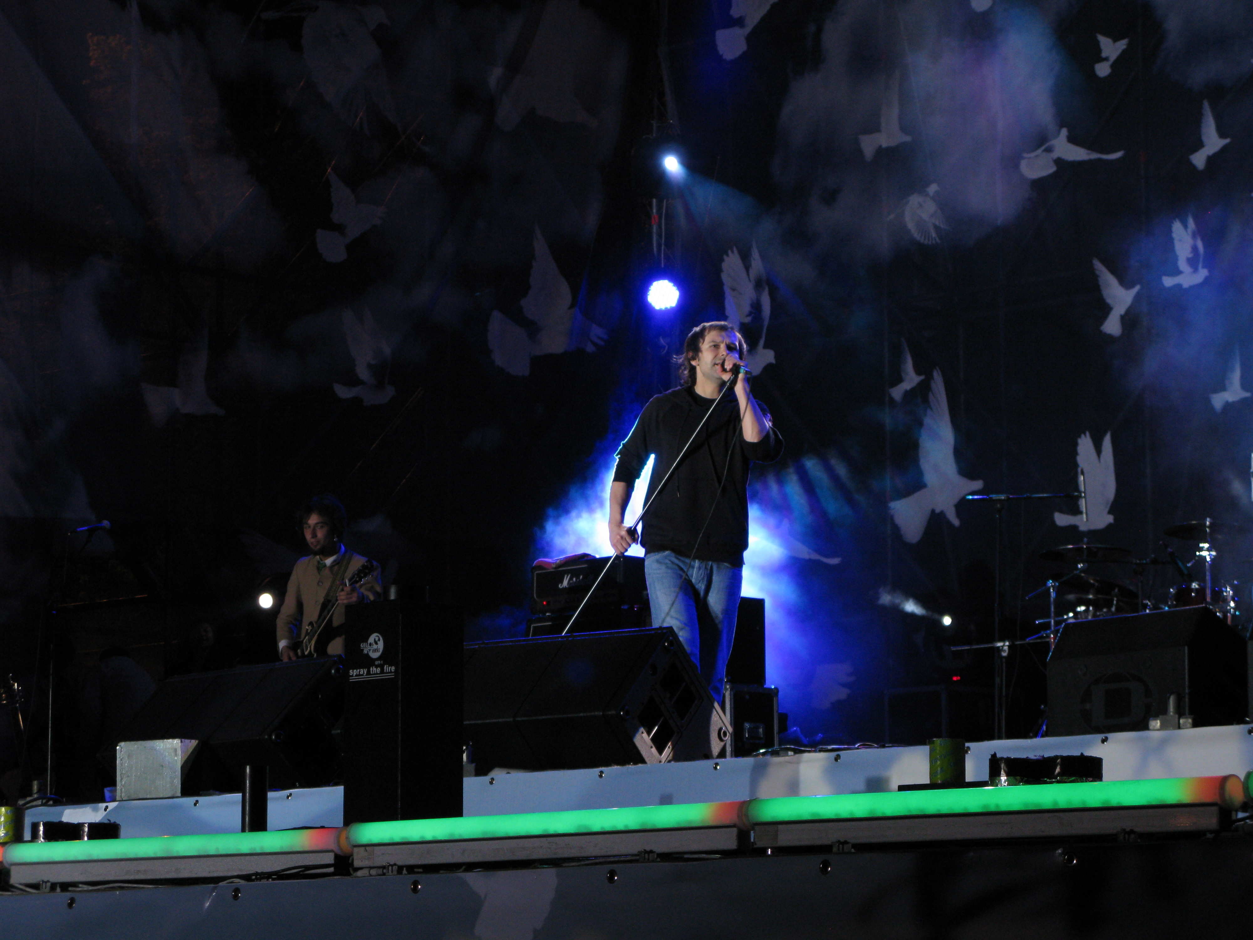 С. Вакарчук на выступлении в Харькове